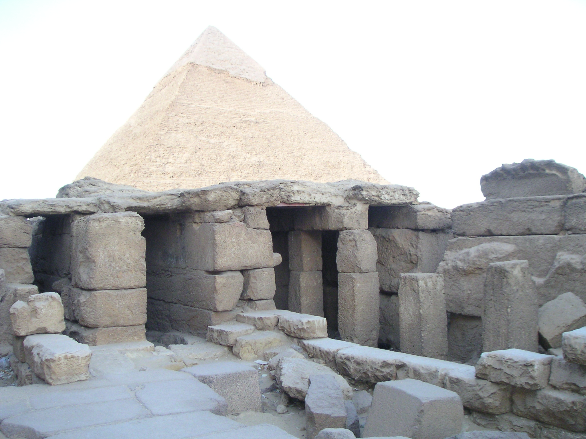 Ruines du temple funéraire de Mykérinos à Gizeh avec vue dans le fond sur la pyramide de son père Khéphren - IVe dynastie égyptienne